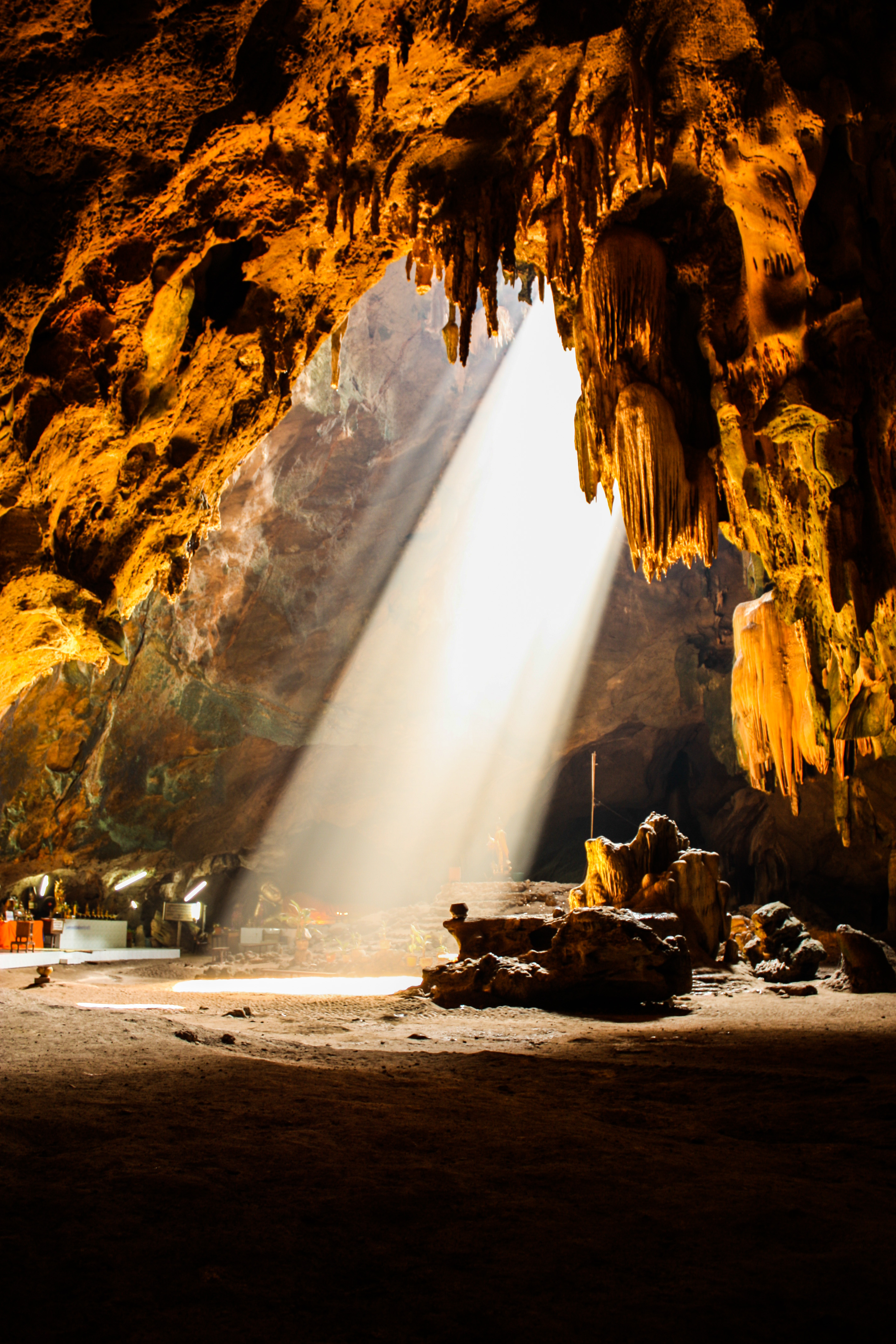 ถ้ำจอมพล